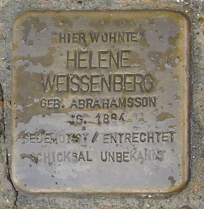 Stolperstein für Helene Weissenberg, Lange Straße 22, Greifswald